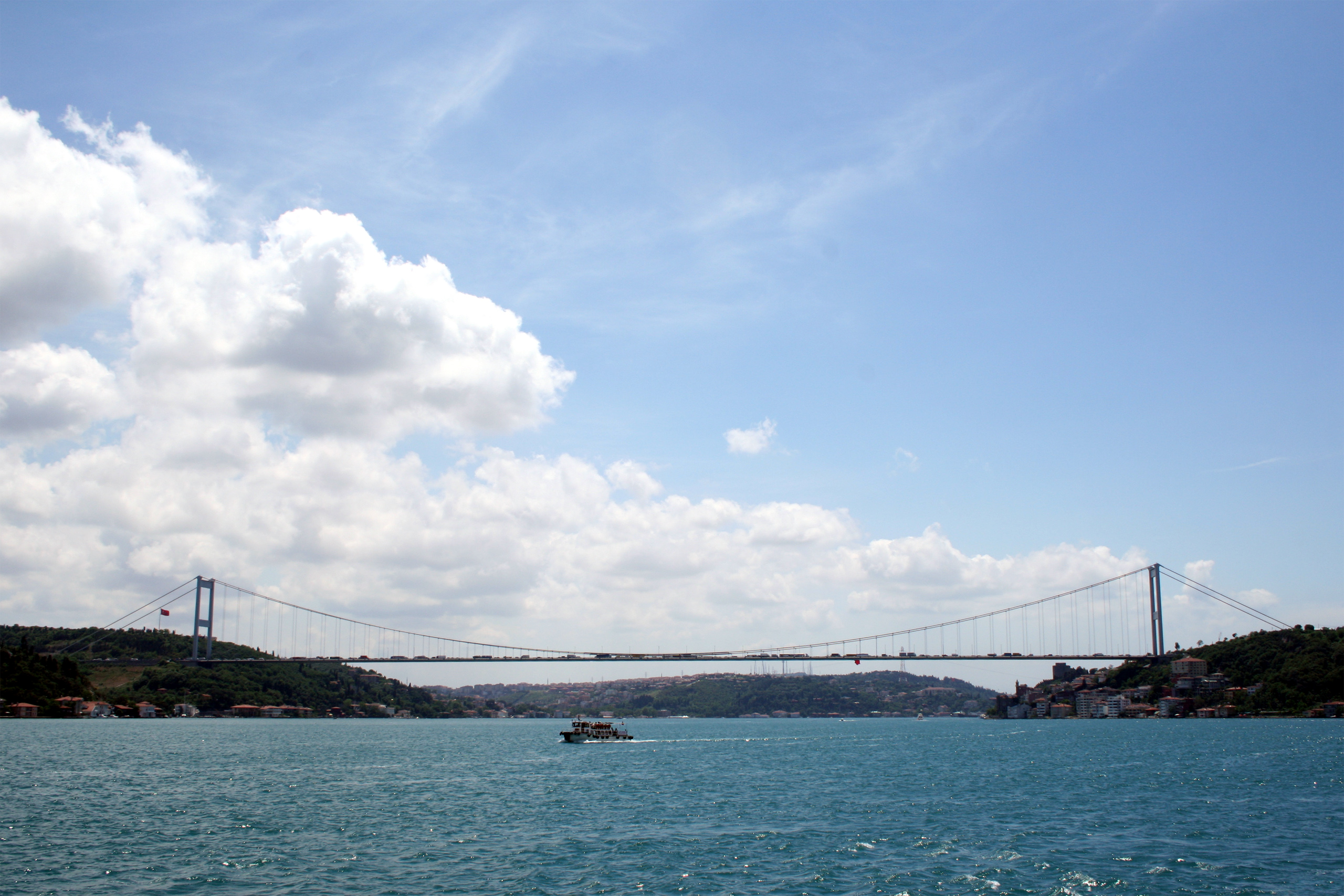 Pont du conquerant au dessus du Bosphore